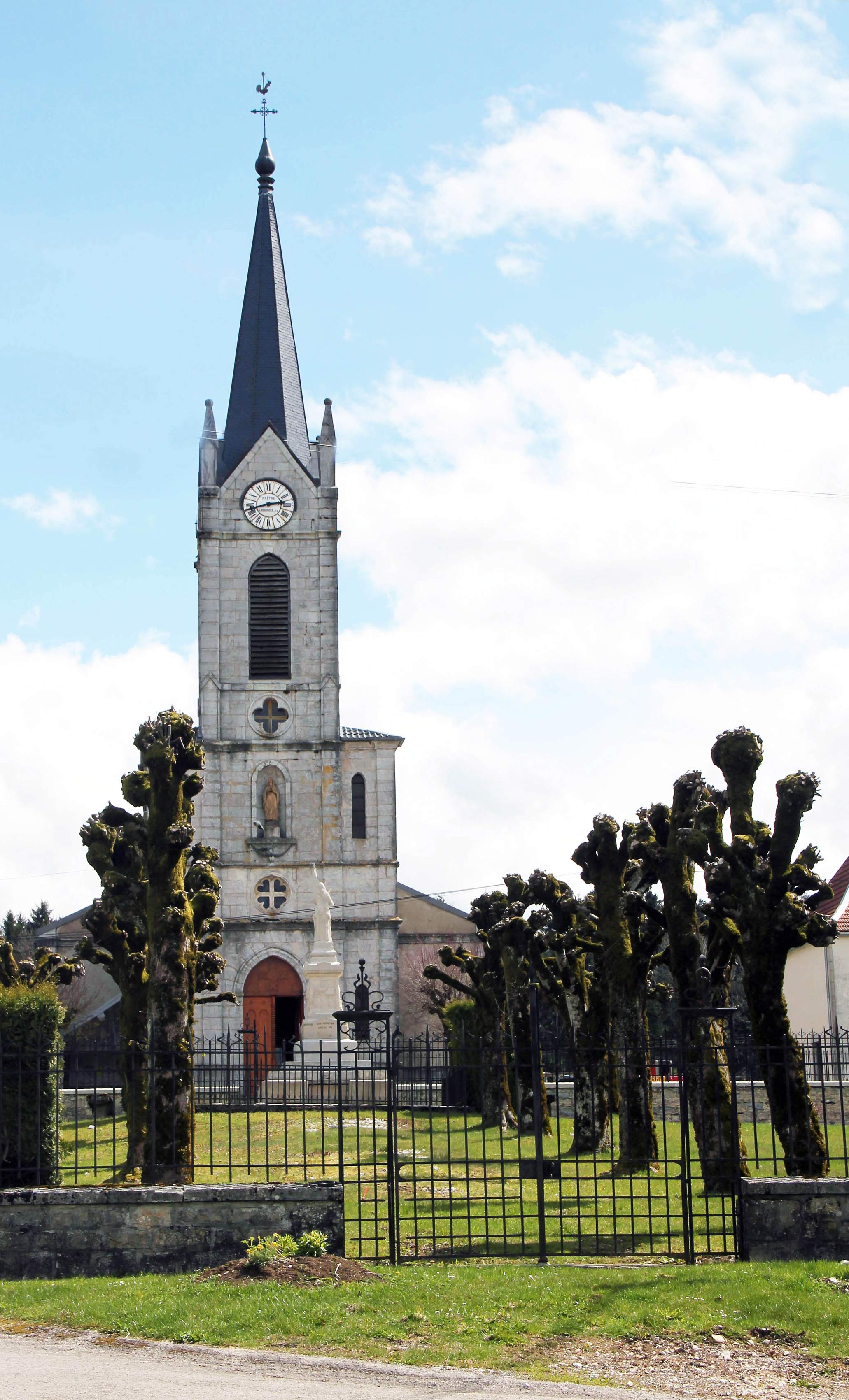 église de Rantechaux (département du Doubs) - seconde moitié du XIXe siècle (église de style néogothique avec un clocher pointu)